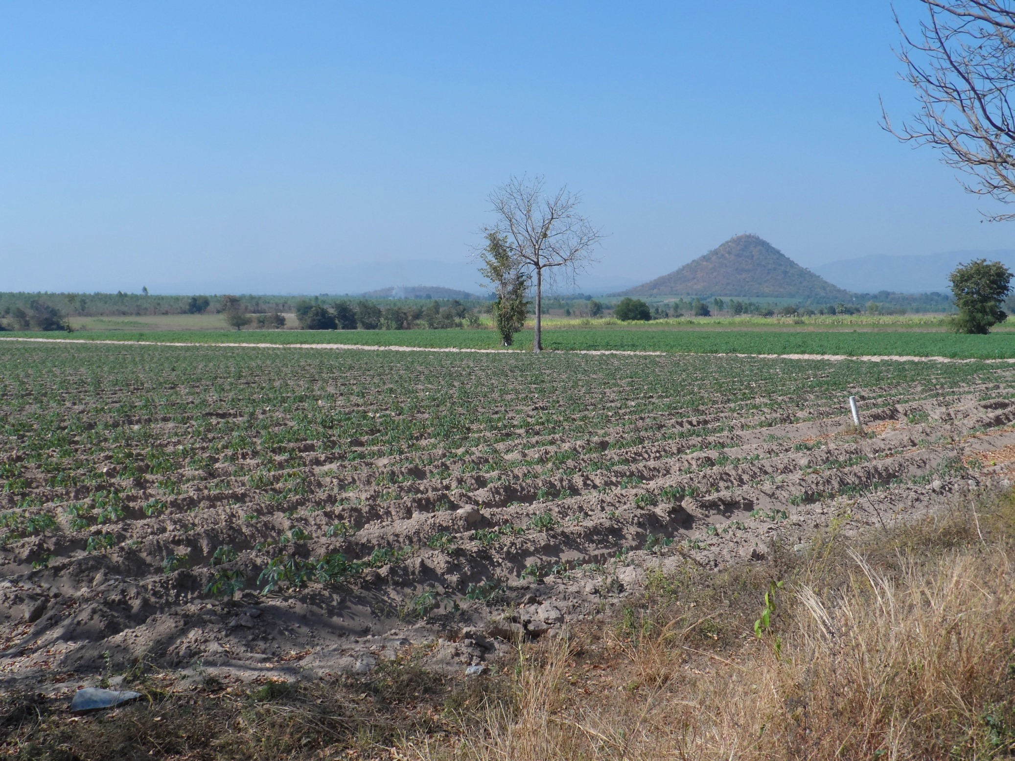 ไร่มันสำปะหลัง บริเวณวัดเขาวัง อำเภอเลาขวัญ จังหวัดกาญจนบุรี